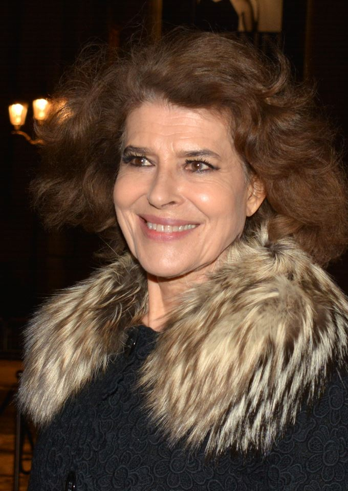 Fanny Ardant au dîner des révélations des César du cinéma